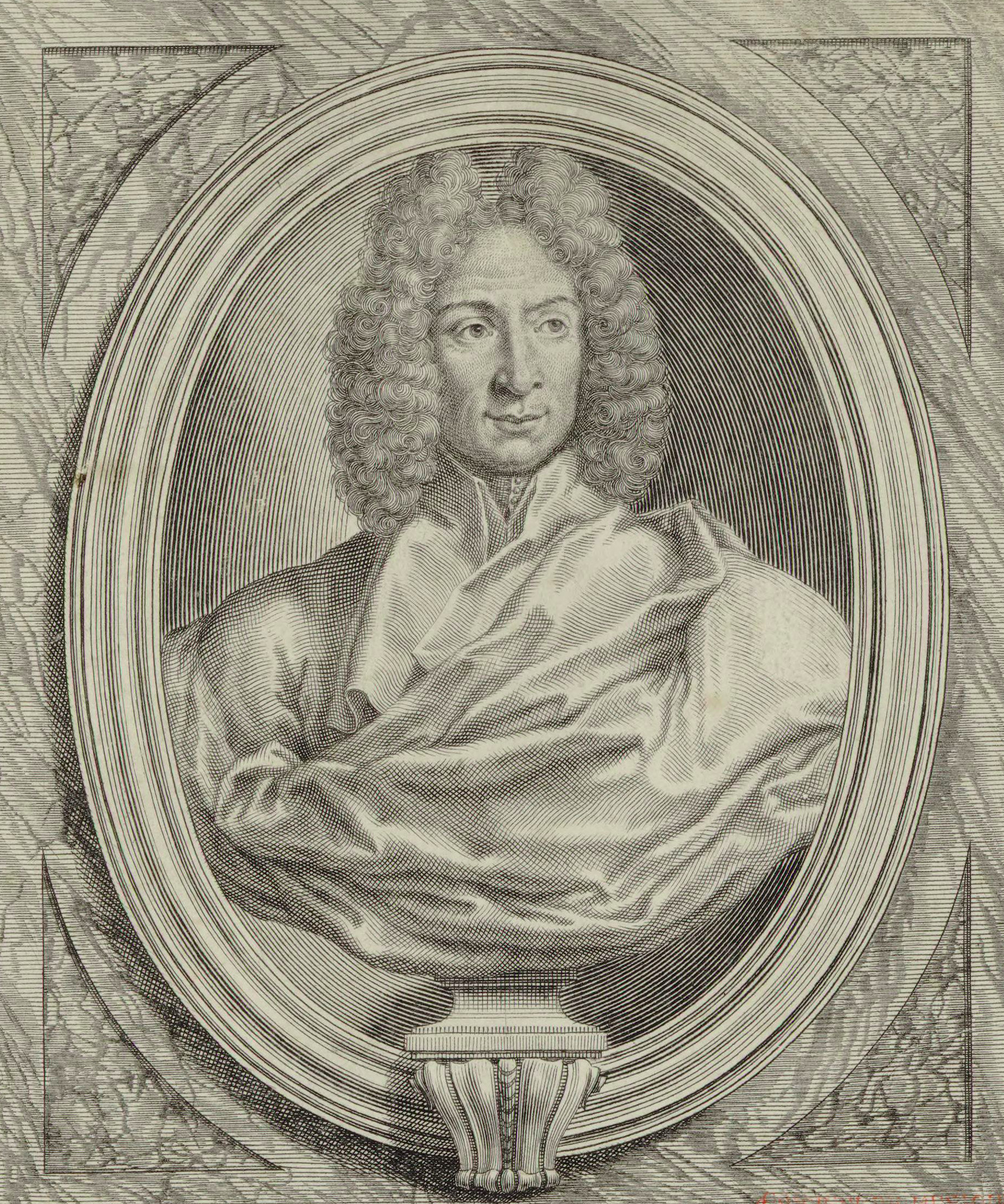 Il compositore Arcangelo Corelli. Incisione da un frontespizio del XVIII secolo dell'Op. VI.